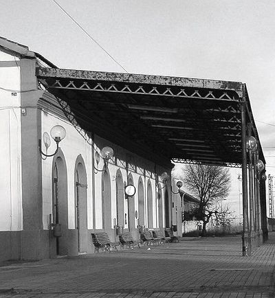 Estación de Ferrocarril Daimiel (Ciudad Real).